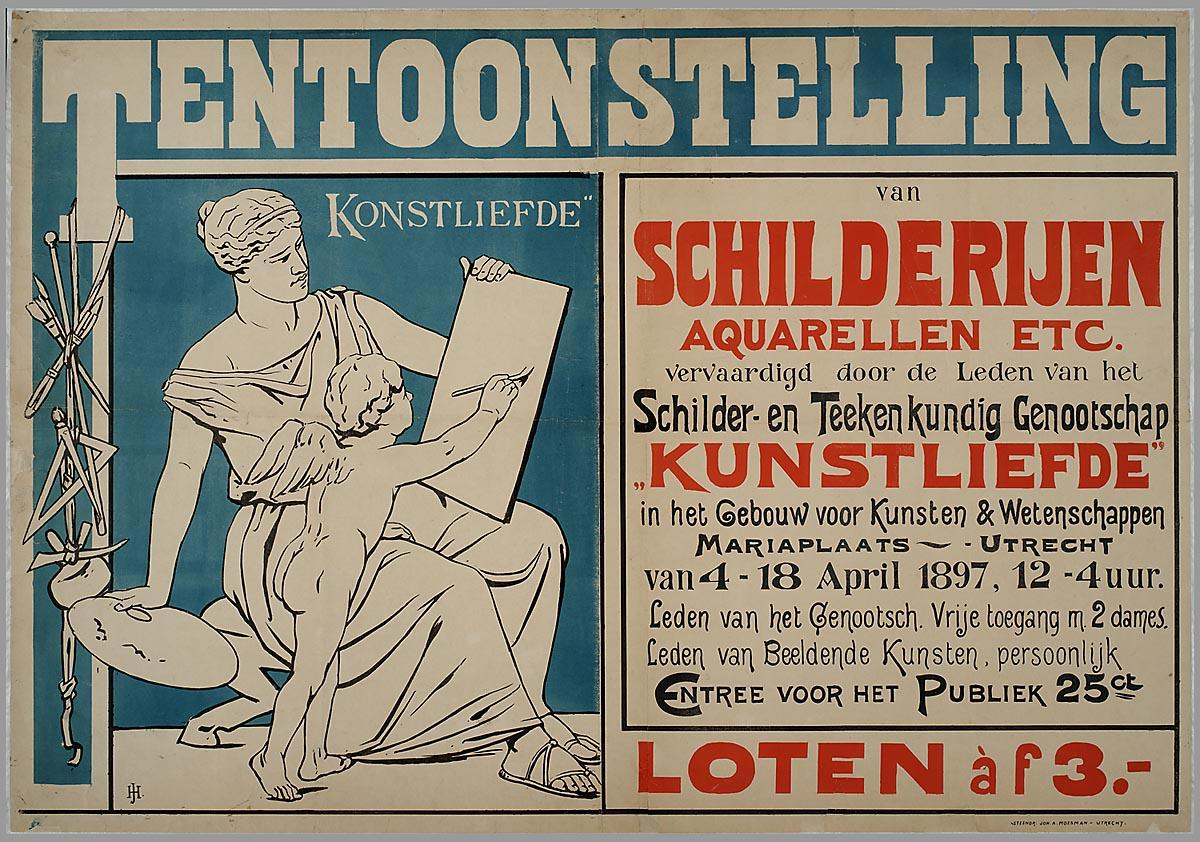 Affiche: Tentoonstelling van schilderijen, aquarellen etc. vervaardigd door de Leden van het Schilder- en Teekenkundig Genootschap "Kunstliefde".